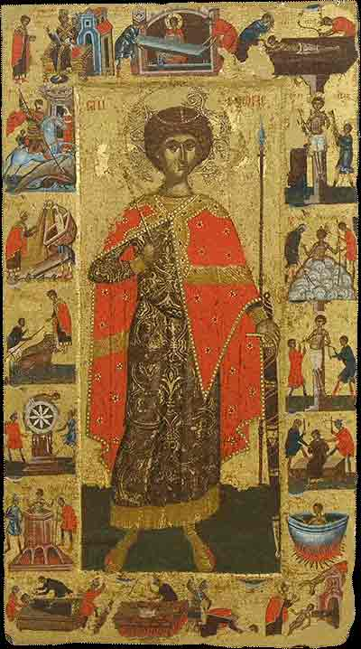 Свети Ѓорѓи (житие) XIV век, црква Свети Ѓорѓија - Струга